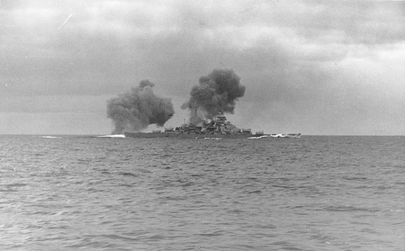 Seegefecht des Schlachtschiffes "Bismarck" in der Dänemarkstraße. Nunmehr richtet Schlachtschiff Bismarck seine ganze Feuerkraft auf das sich zurückziehende Schlachtschiff "Prince of Wales". Prop.Kp.:MPA Nord Film-Nr. 100/27 Bildberichter: Lagemann Wilhelmshaven; Herausgabedatum: Juni 1941